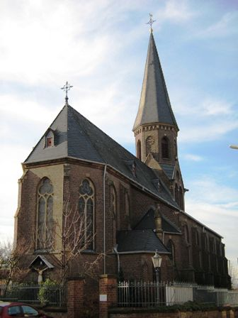 Die Pfarrkirche St. Cyriakus von der Nord-Ost-Seite